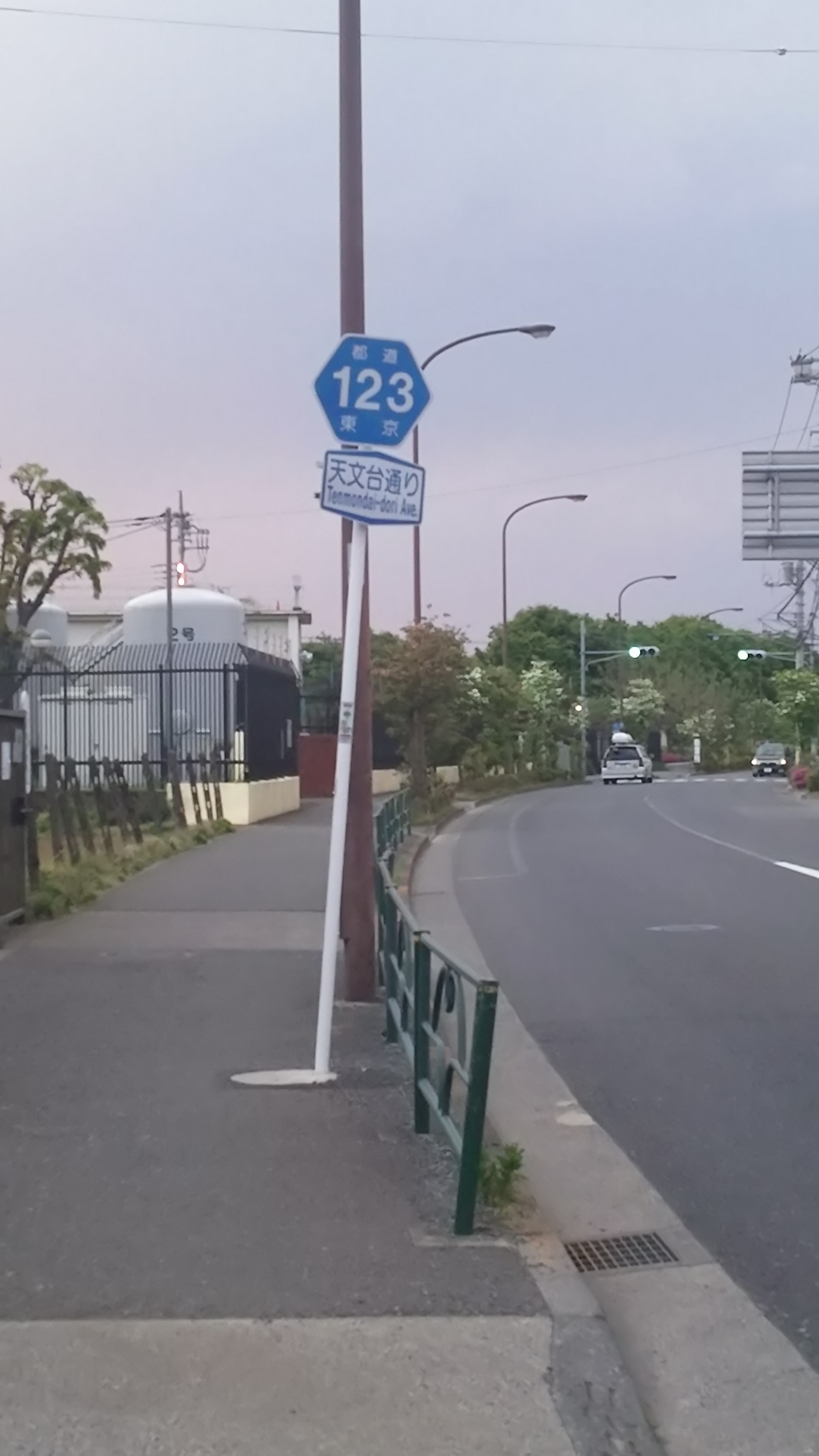 東京都道123号 調布市にて